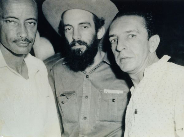 El Comandante Camilo Cienfuegos, heroe de la Revolucion Cubana, visito Bayamo, la Ciudad Monumento Nacional de Cuba, a pocos dias del triunfo de la Revolucion. En la foto, Robert A. Paneque (izquerdo) y Rolando Abello (derecho).